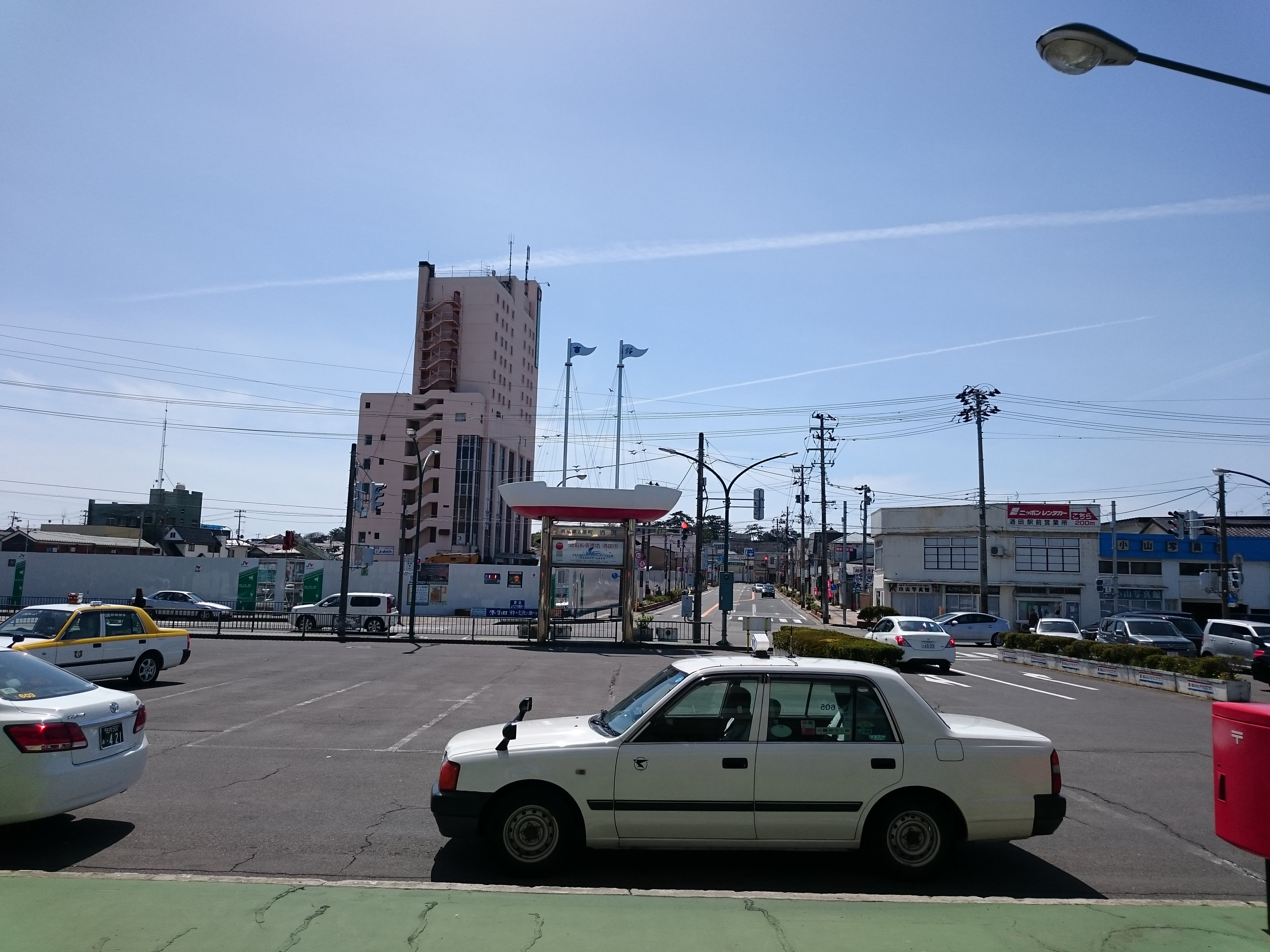 再開発が進む酒田駅前